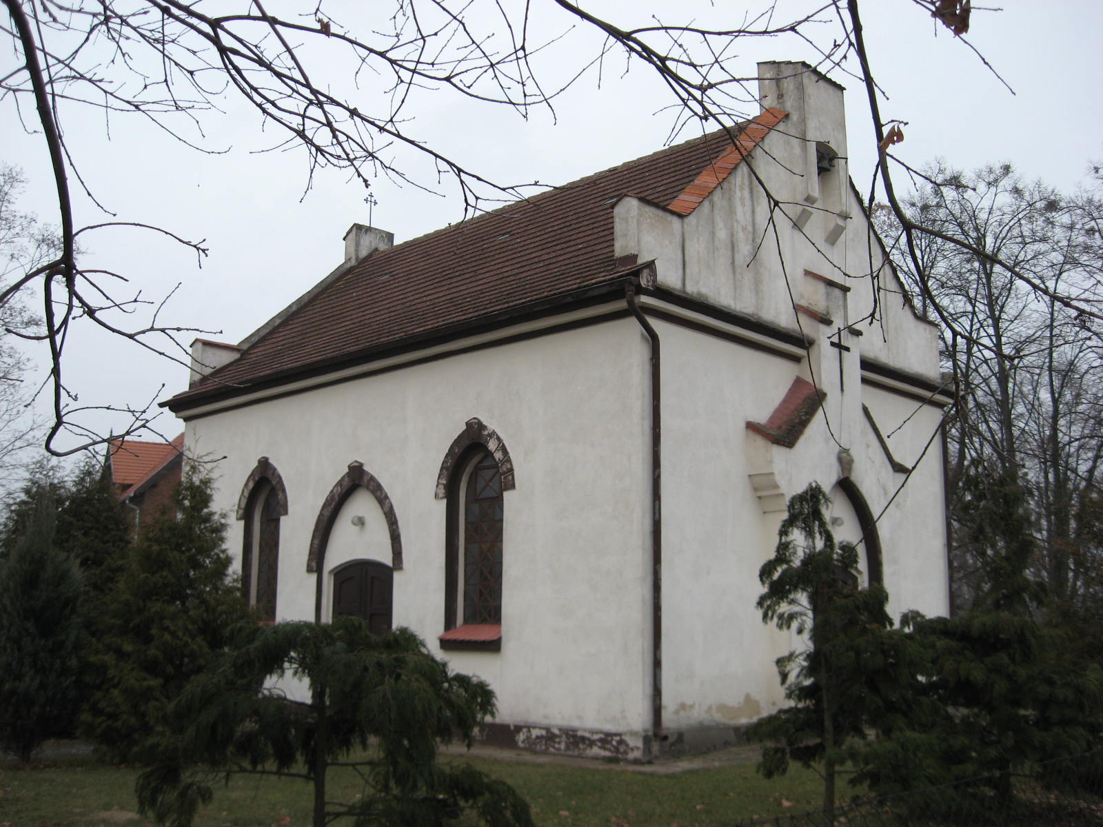 Ewangelicka kaplica cmentarna w Ligocie Dolnej